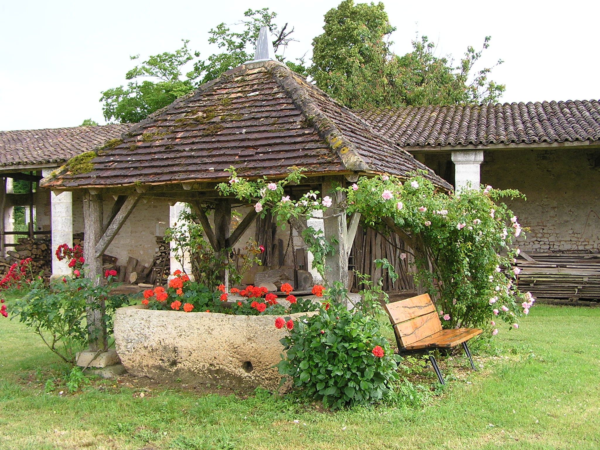 puits devant le château de Balzac